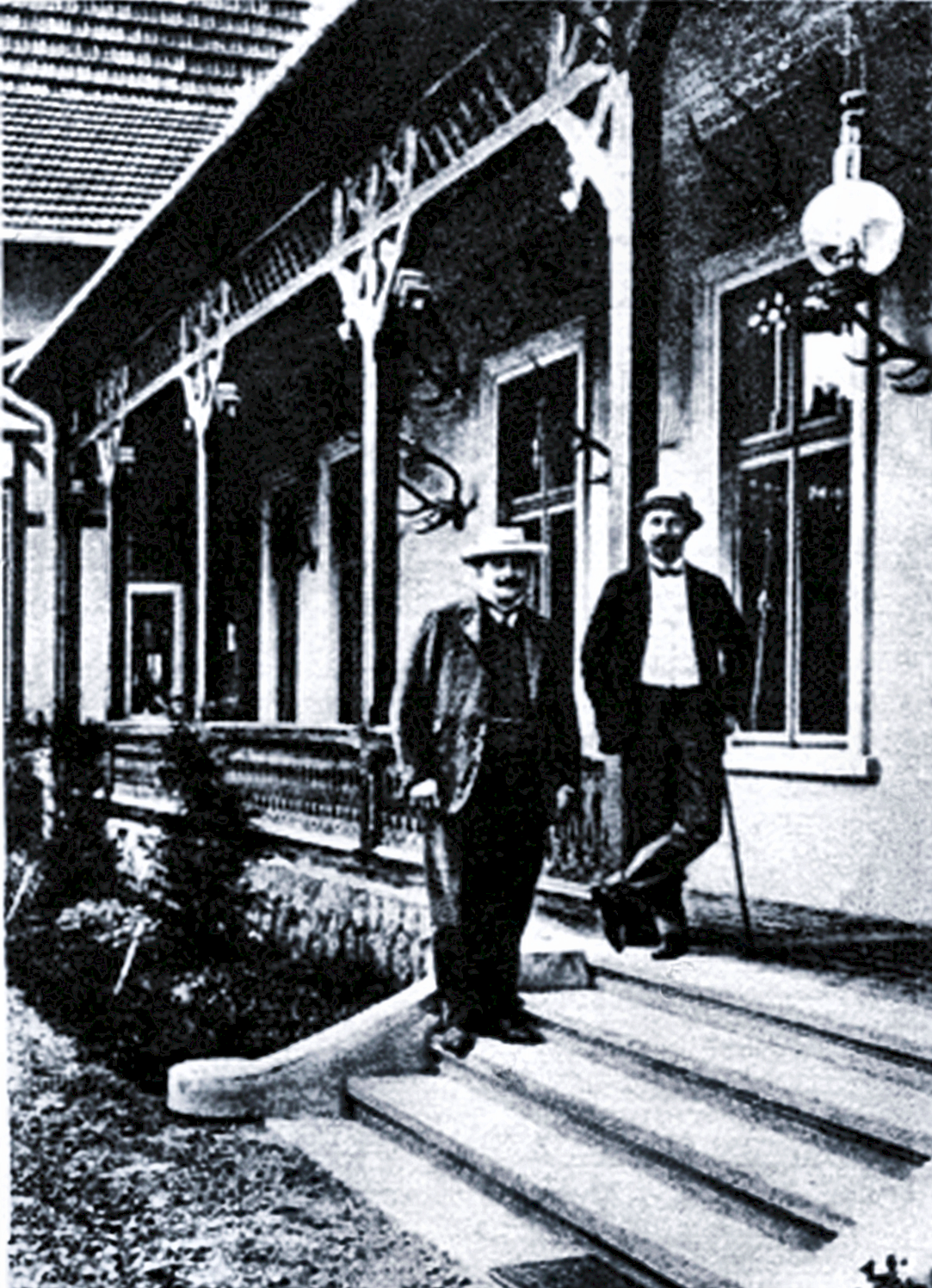 Landespräsident Prinz Hohenlohe und Landeshauptmann Graf Georg Wassilko von Serecki 1904